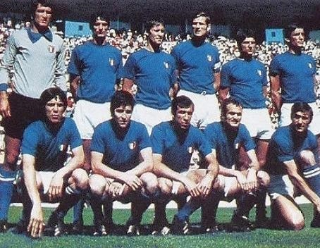 Squadra azzura italiano vice-campione del mondo 1970, 'Mexico 70 - World Cup Story', Panini figurina n°51 (finale).